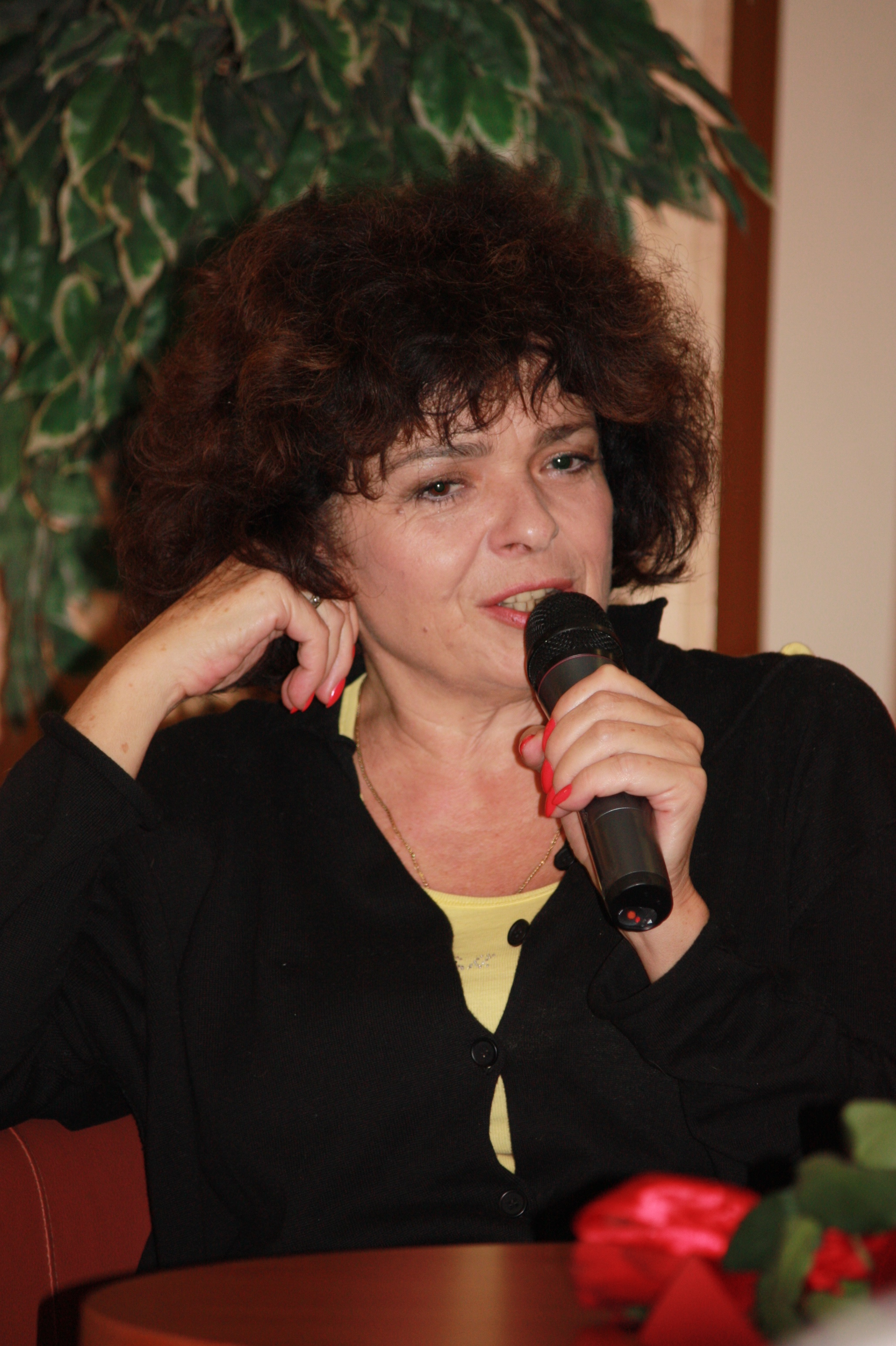 Katarzyna Grochola na spotkaniu autorskim w Domu Kultury Uśmiech w Ożarowie Mazowieckim